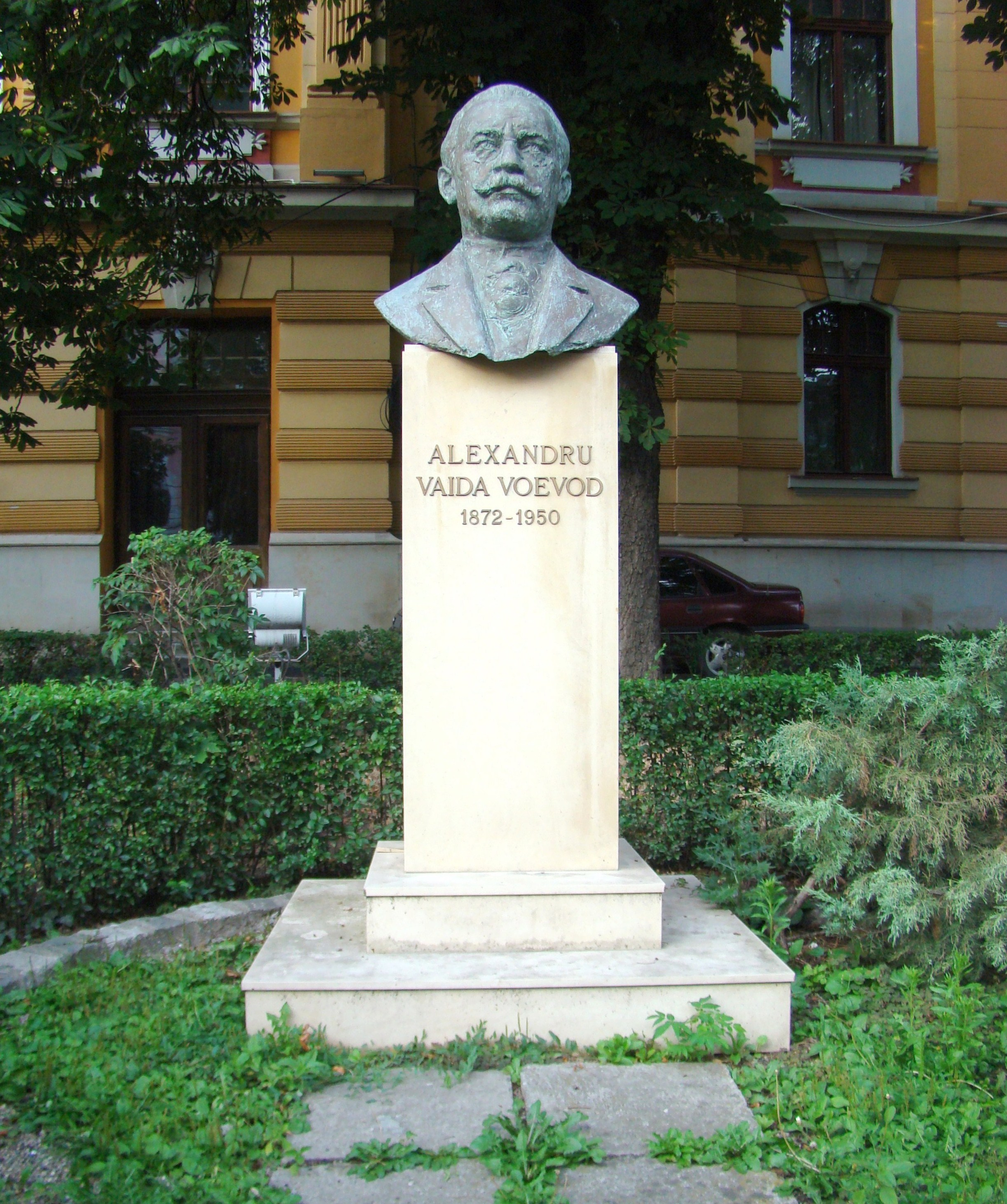 Bustul lui Alexandru Vaida Voevod din Cluj, operă a sculptorului Ilarion Voinea